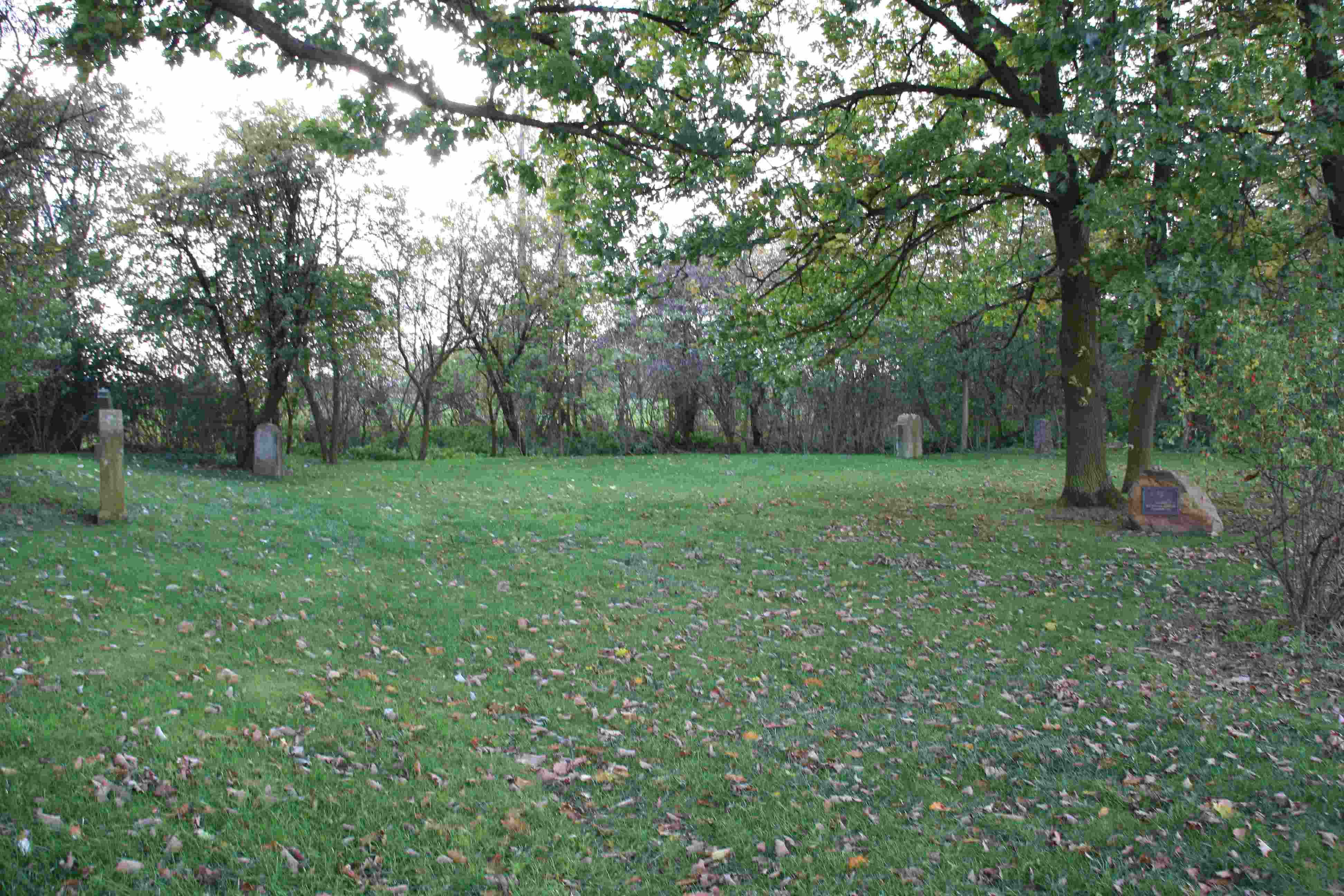 Jüdischer Friedhof Erp 07